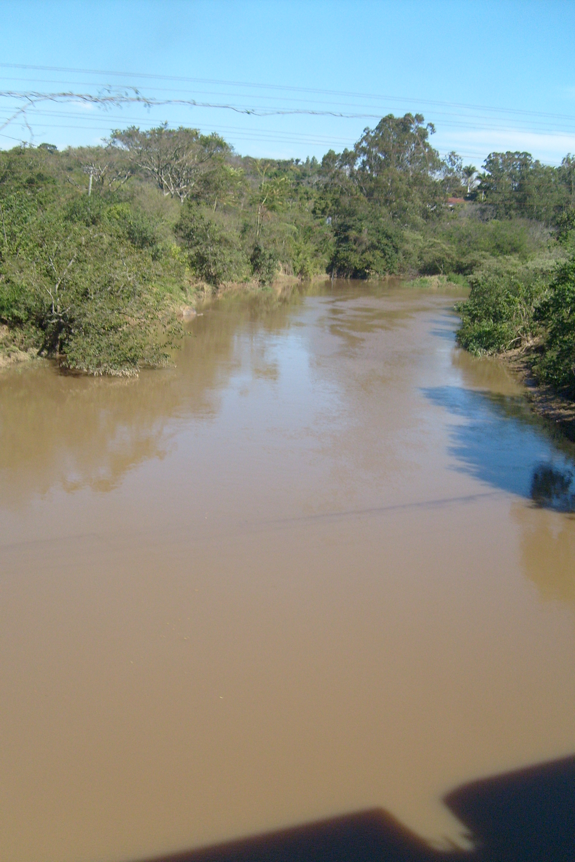 Rio Atibaia, in Campinas, São Paulo, BRazil